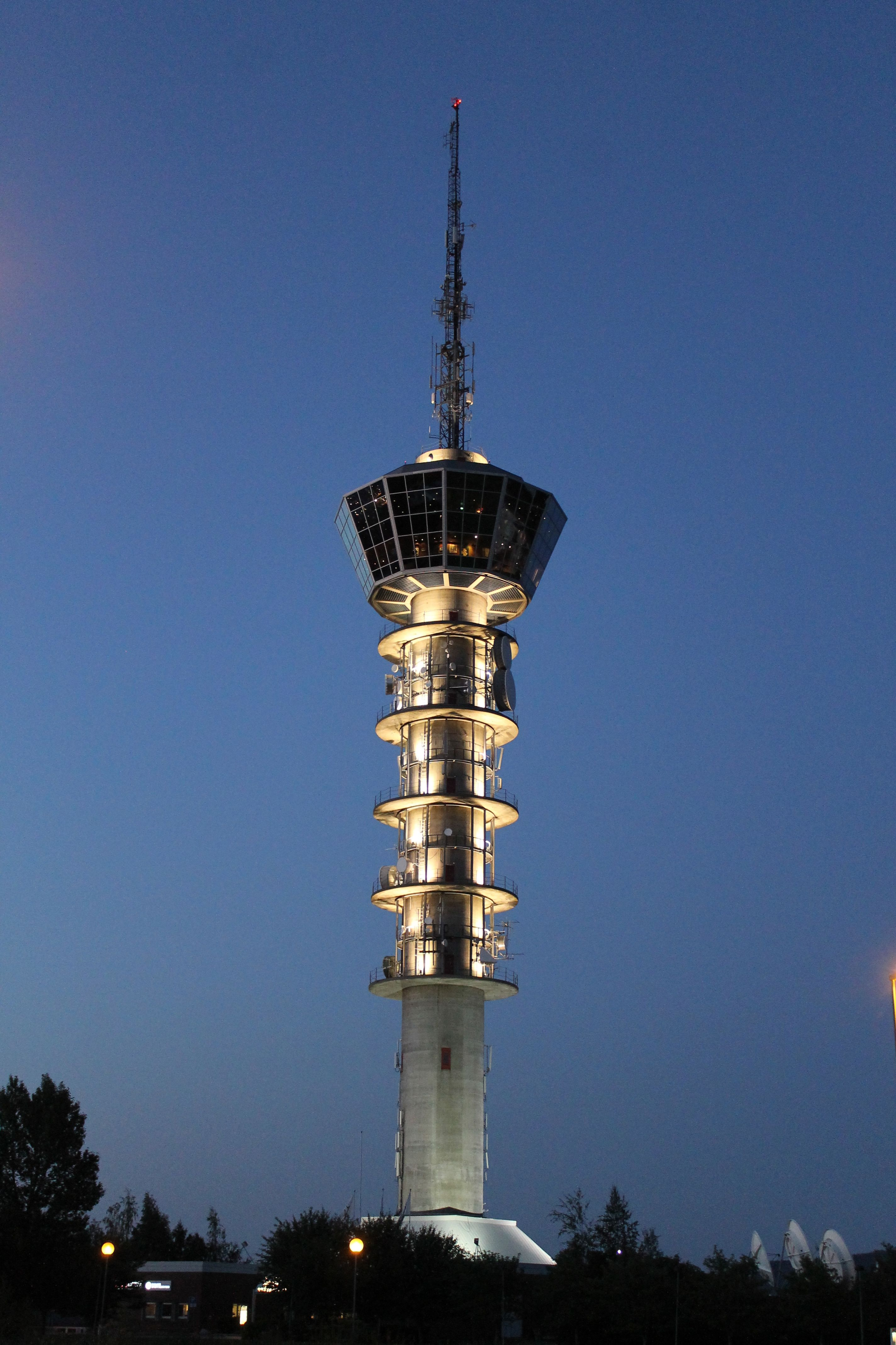 Tour de Tyholt (Trondheim)